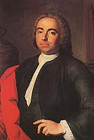 Klokkengieter Joris Dumery - Brugge - West-Vlaanderen - België